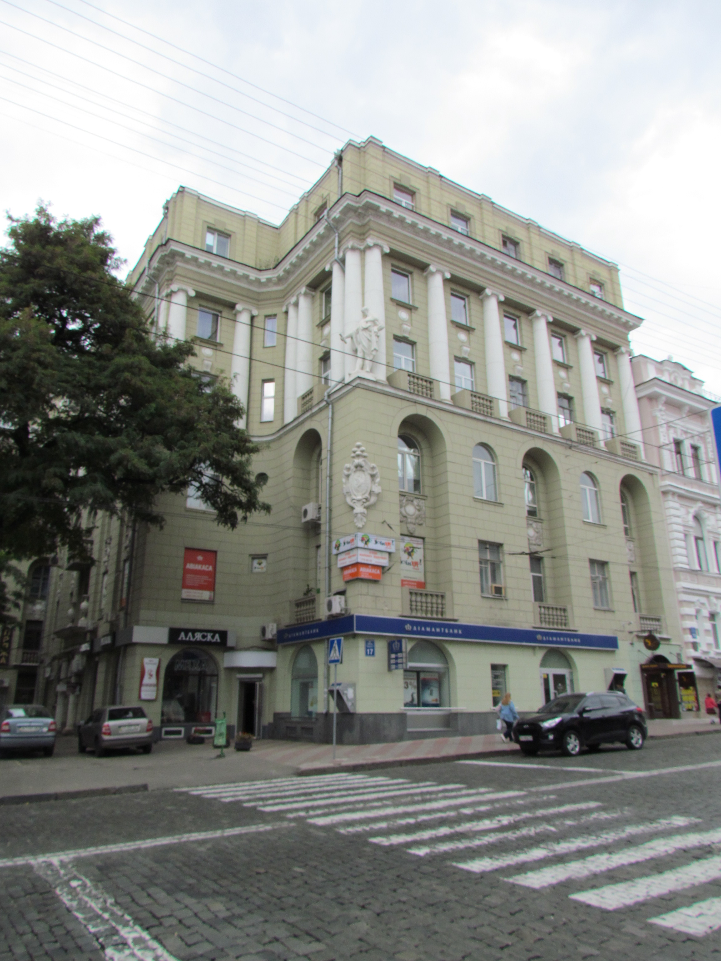 Україна, Харків, вул. Сумська, 17